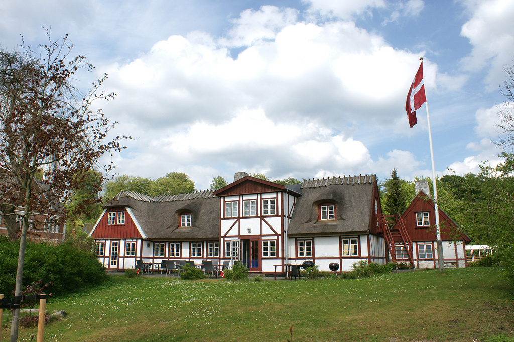 Annexgården in Hareskov north of Copenhagen, Denmark fotograf: Niels Plum Ved brug af foto skal fotografens navn anføres.